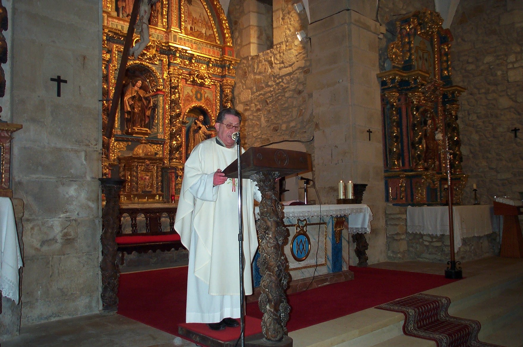 Ermita de San Mamés (interior), Cerbiago, Cantabria